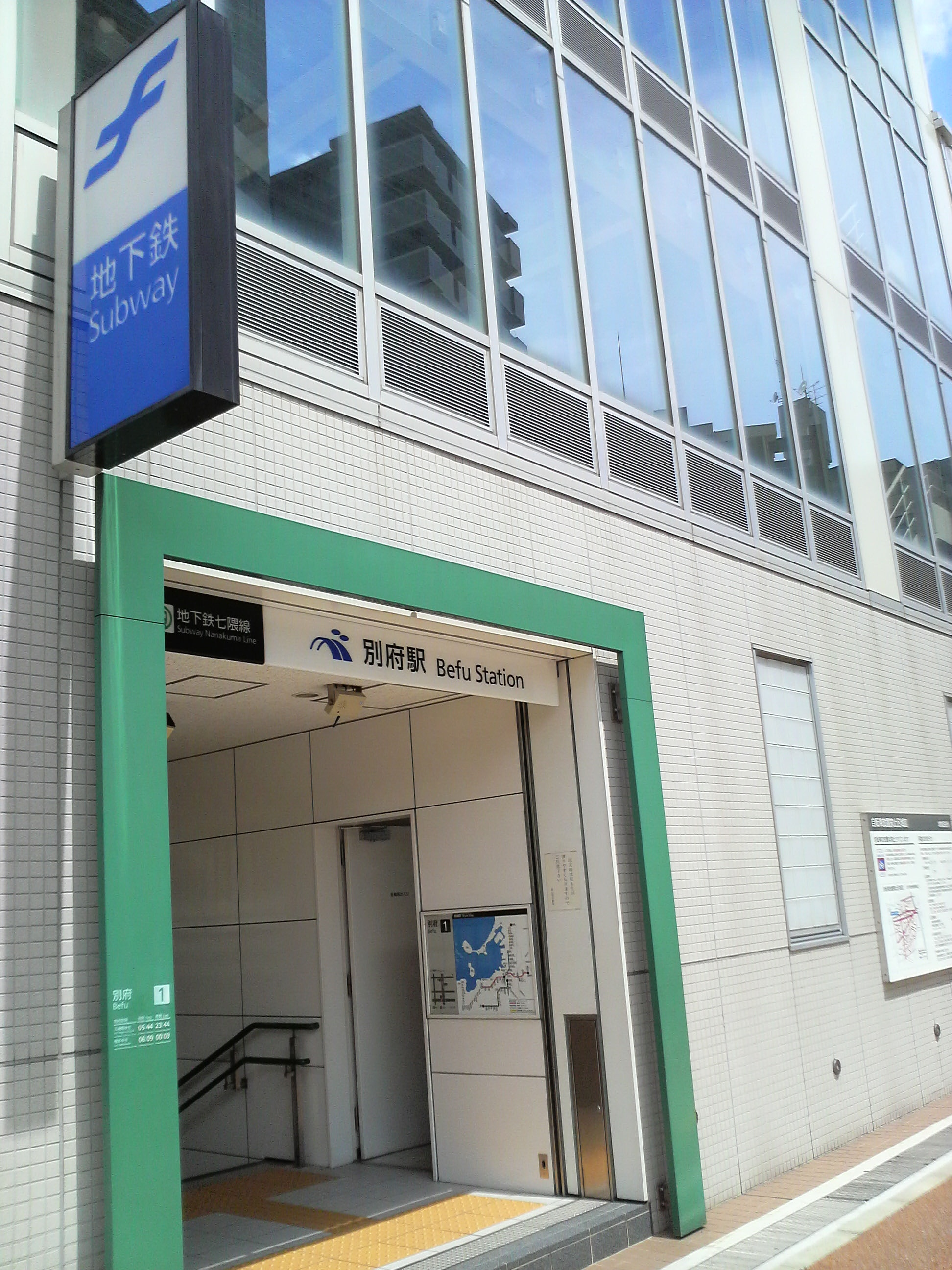 福岡市地下鉄七隈線別府駅1番出口